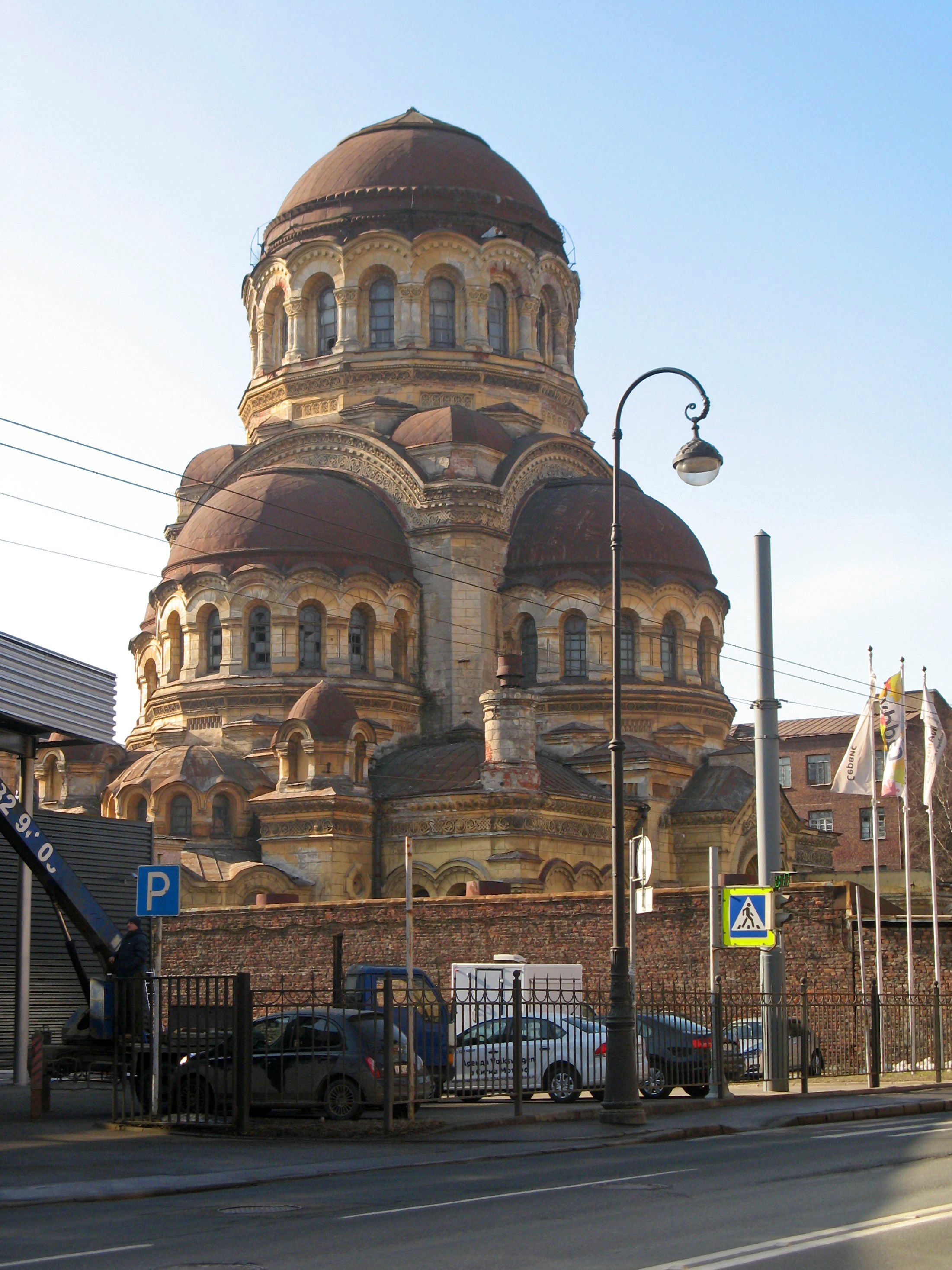 Церковь Милующей иконы Божией Матери: Большой проспект Васильевского острова, 100, Василеостровский район, Санкт-Петербург